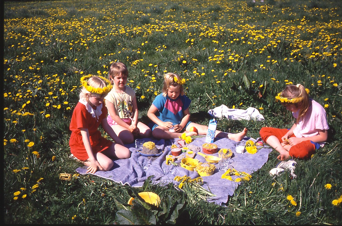 26. - Børn på mark. - Solen er livgivende. Sollyset fremmer optagelsen af vitamin D.